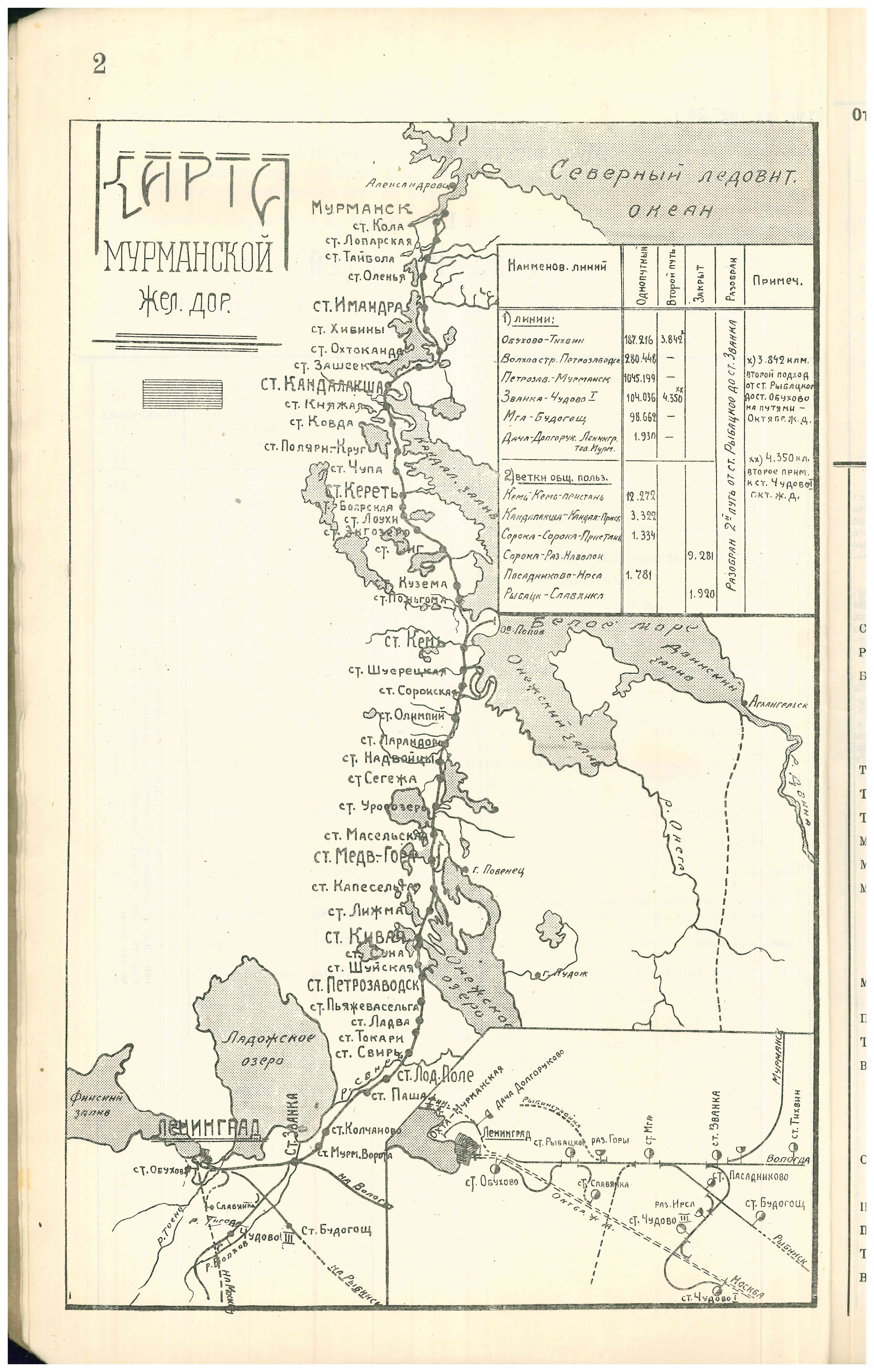 Карта Мурманской железной дороги. 1926 г.